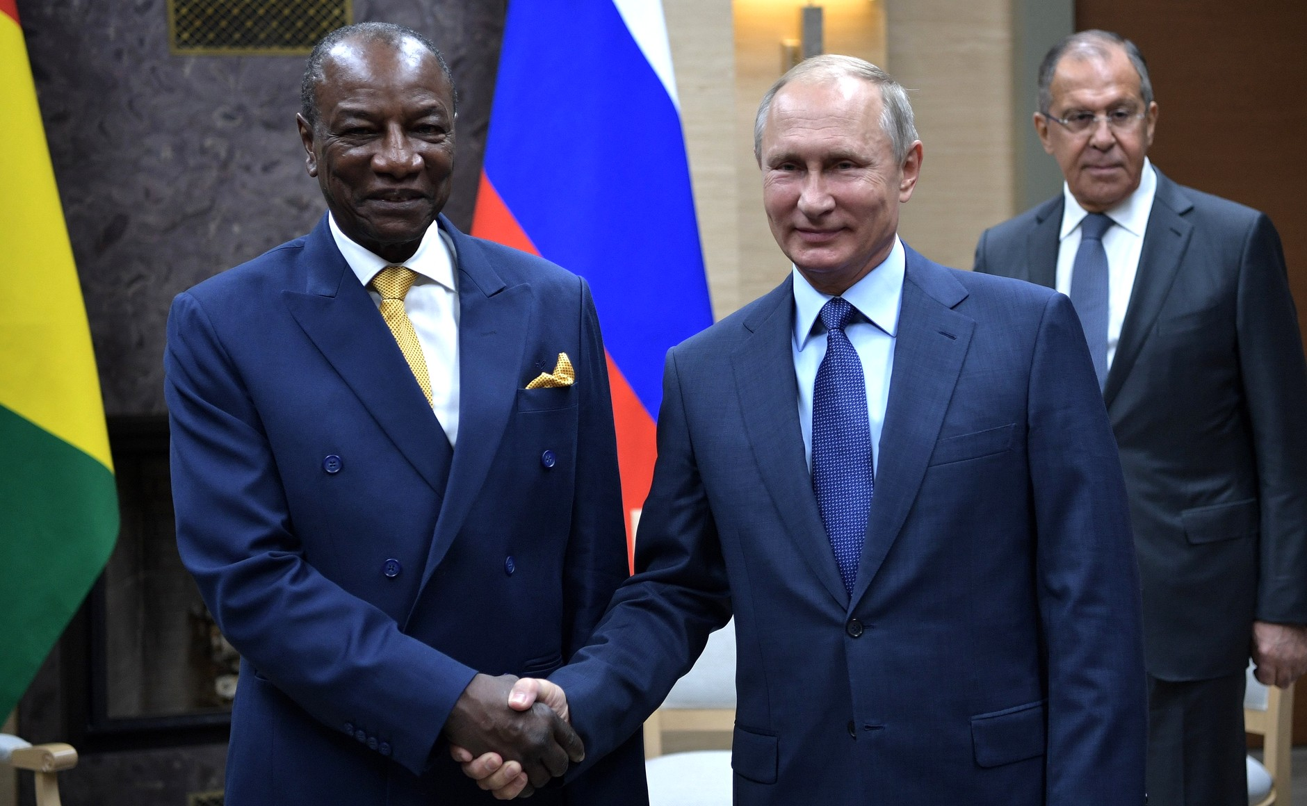 Президент России Владимир Путин с Президентом Гвинейской Республики, действующим Председателем Африканского союза Альфой Конде